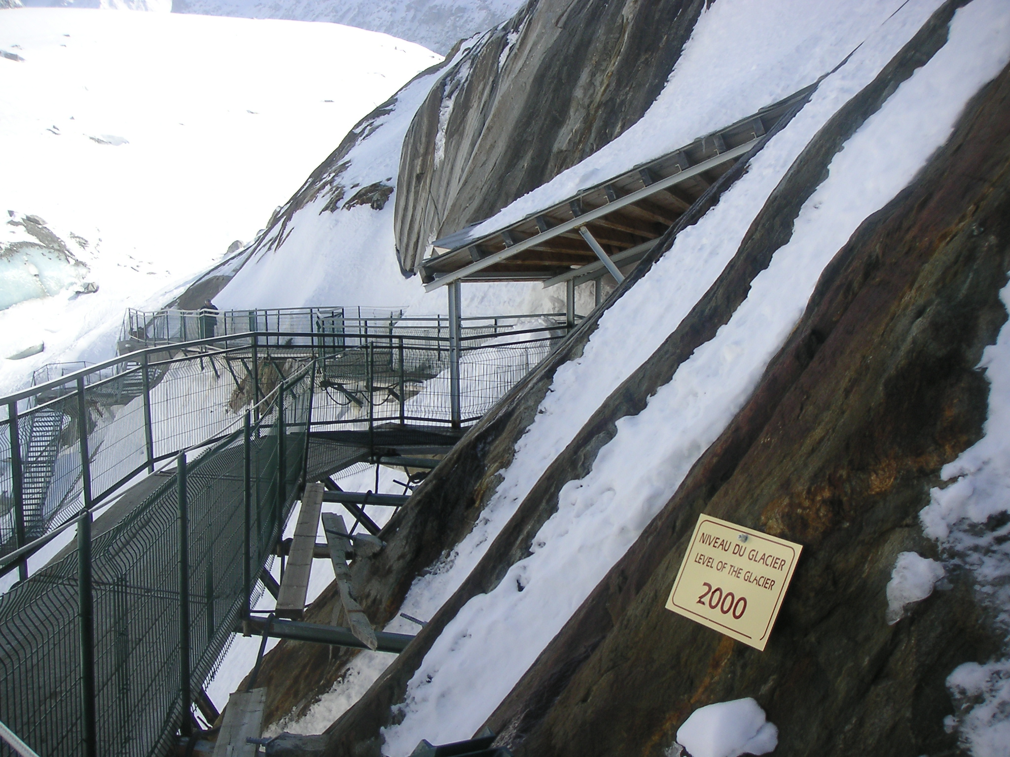 Vallée blanche - niveau du glacier en l'an 2000